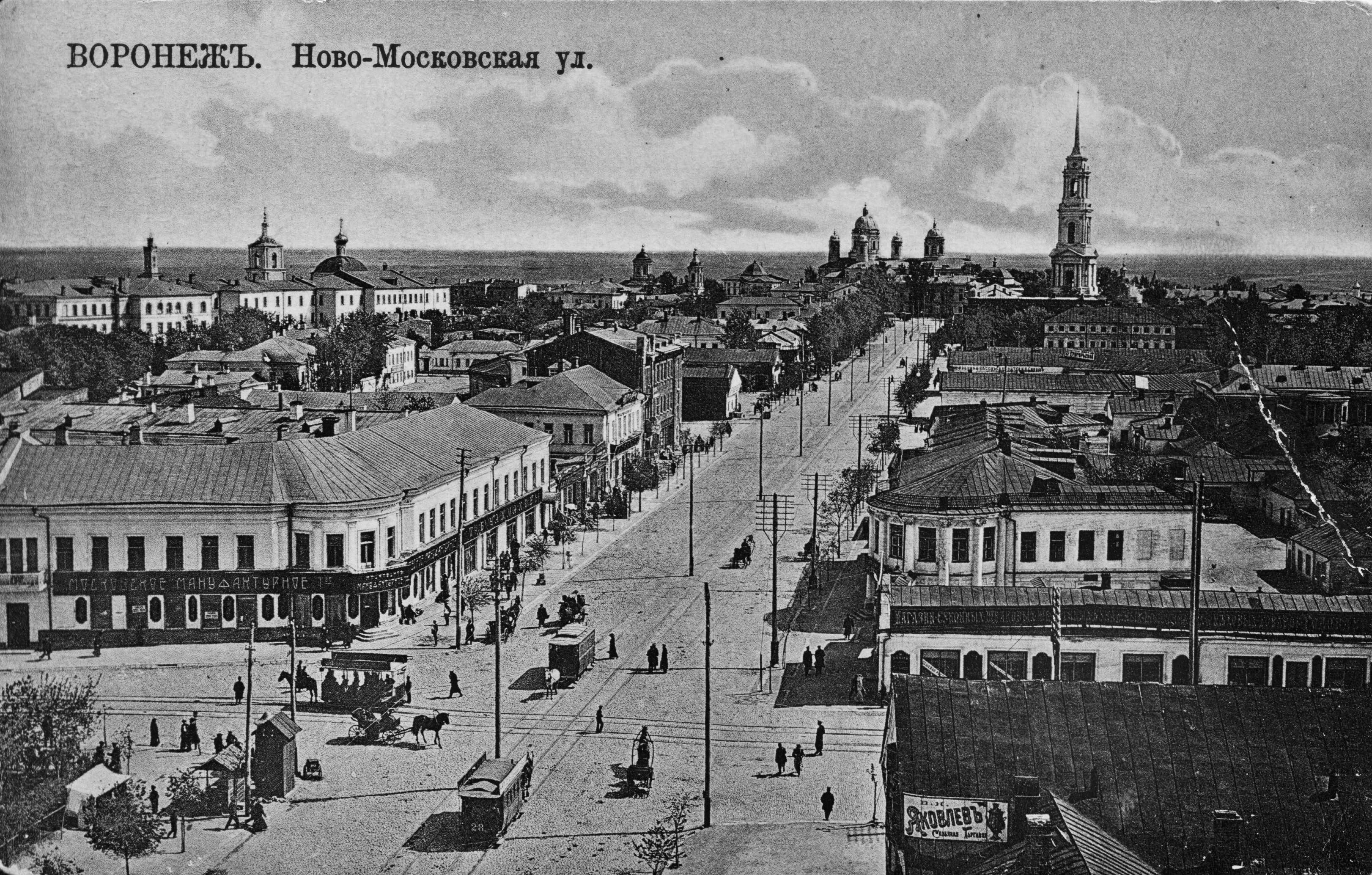 Новомосковская улица, Воронеж, на рубеже XIX-XXвв